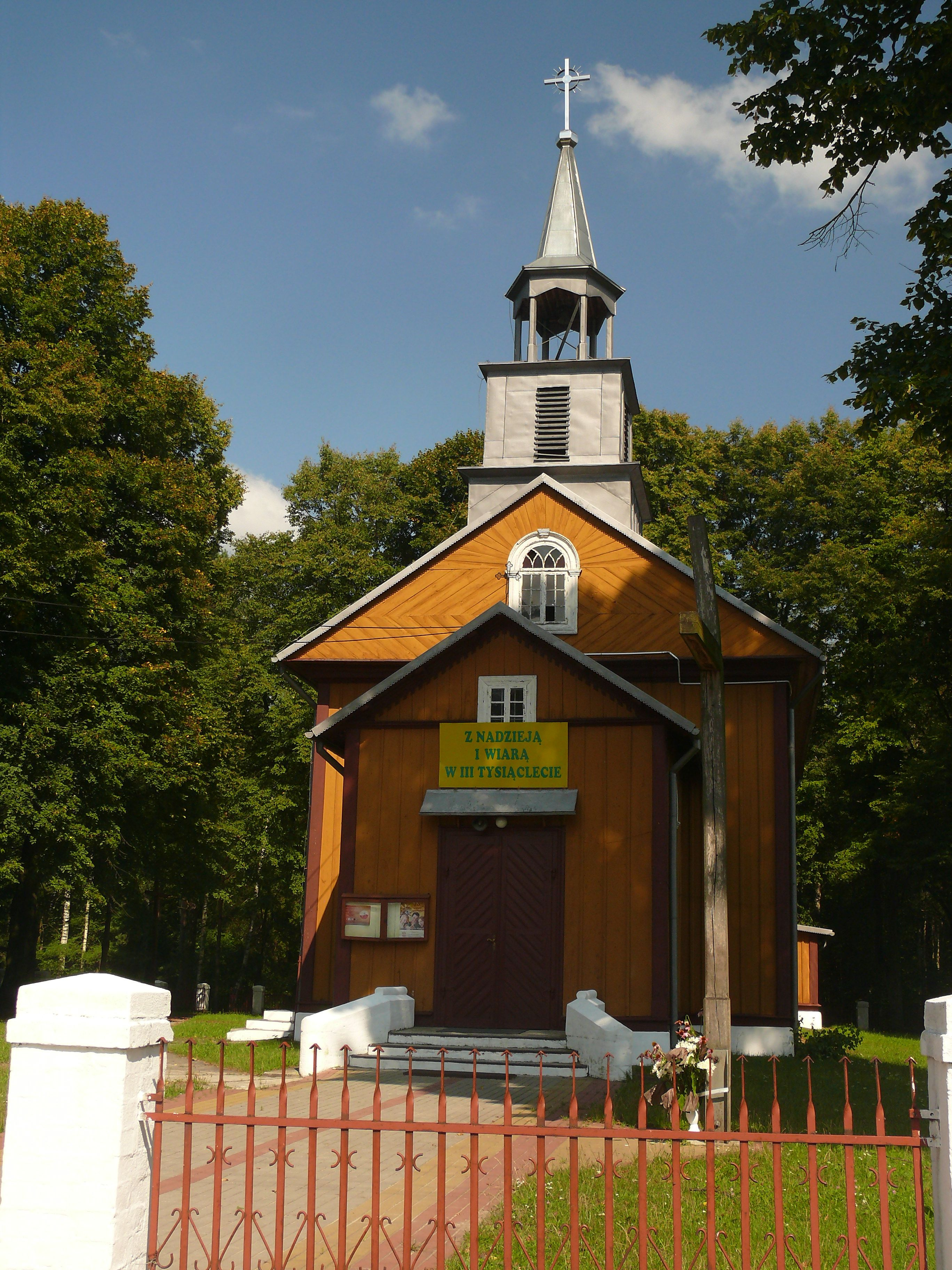 Kościół pod wezwaniem Św. Jana Chrzciciela w Trzęsinach